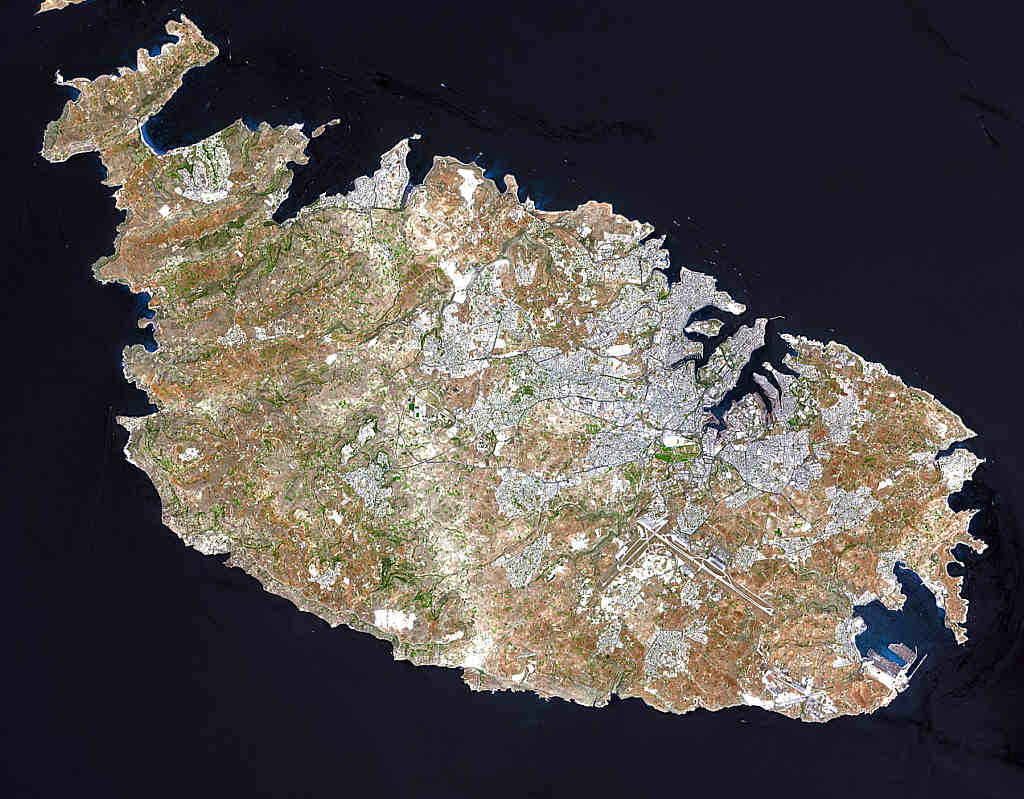 Satellitenbild Malta Aufnahmedatum: 29. Juli 2001